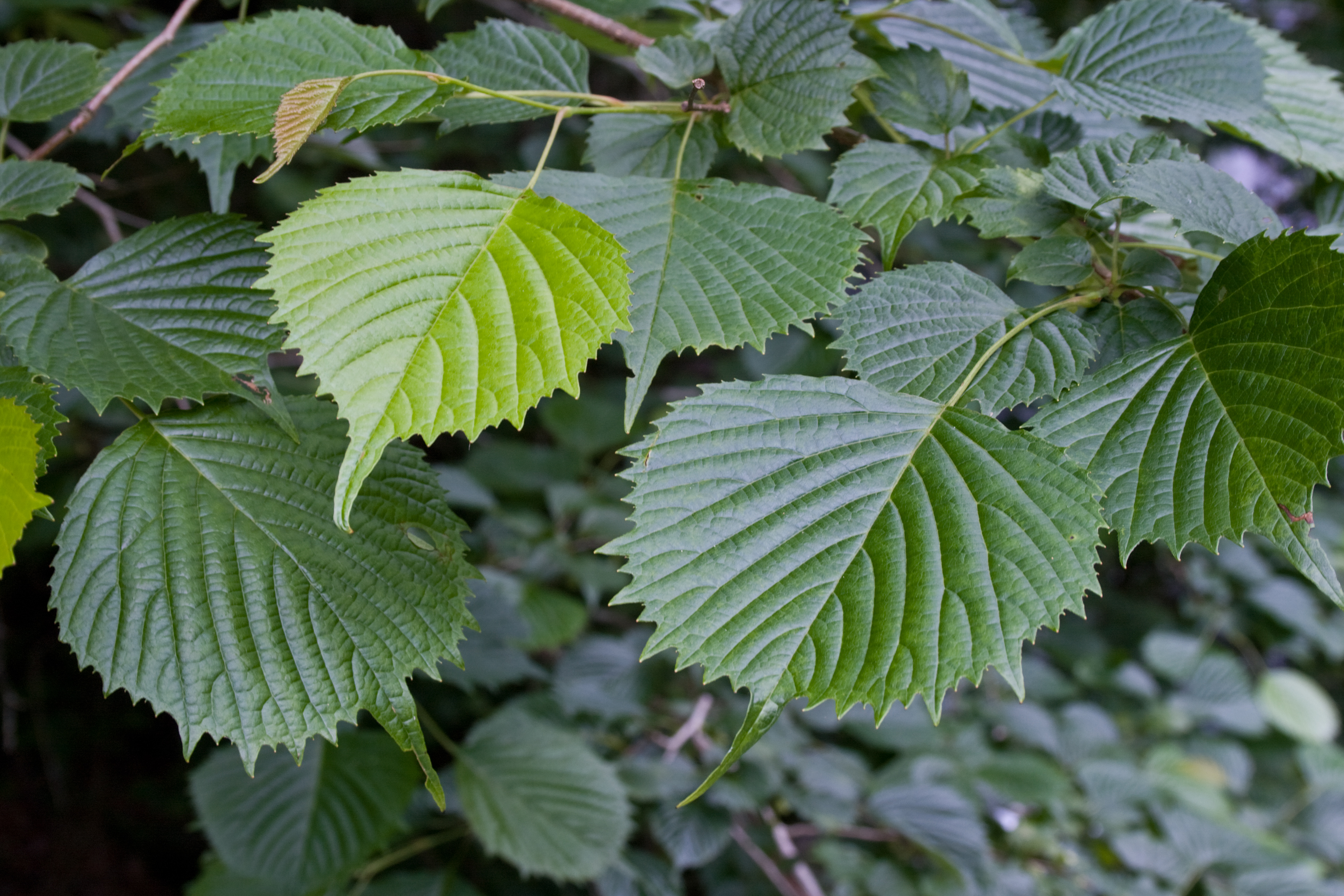 フサザクラ (学名:Euptelea polyandra)